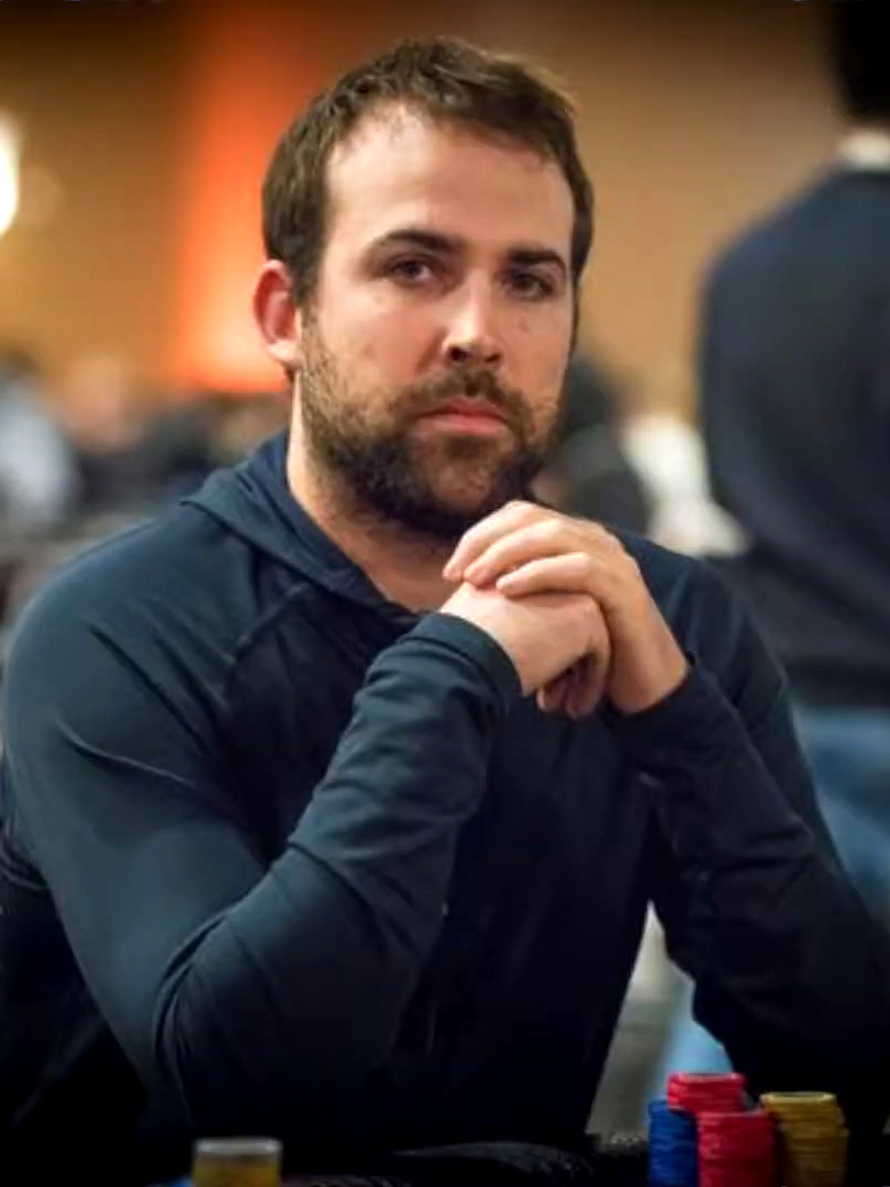 Pascal Lefrançois bei den partypoker Live Millions Grand Final Barcelona